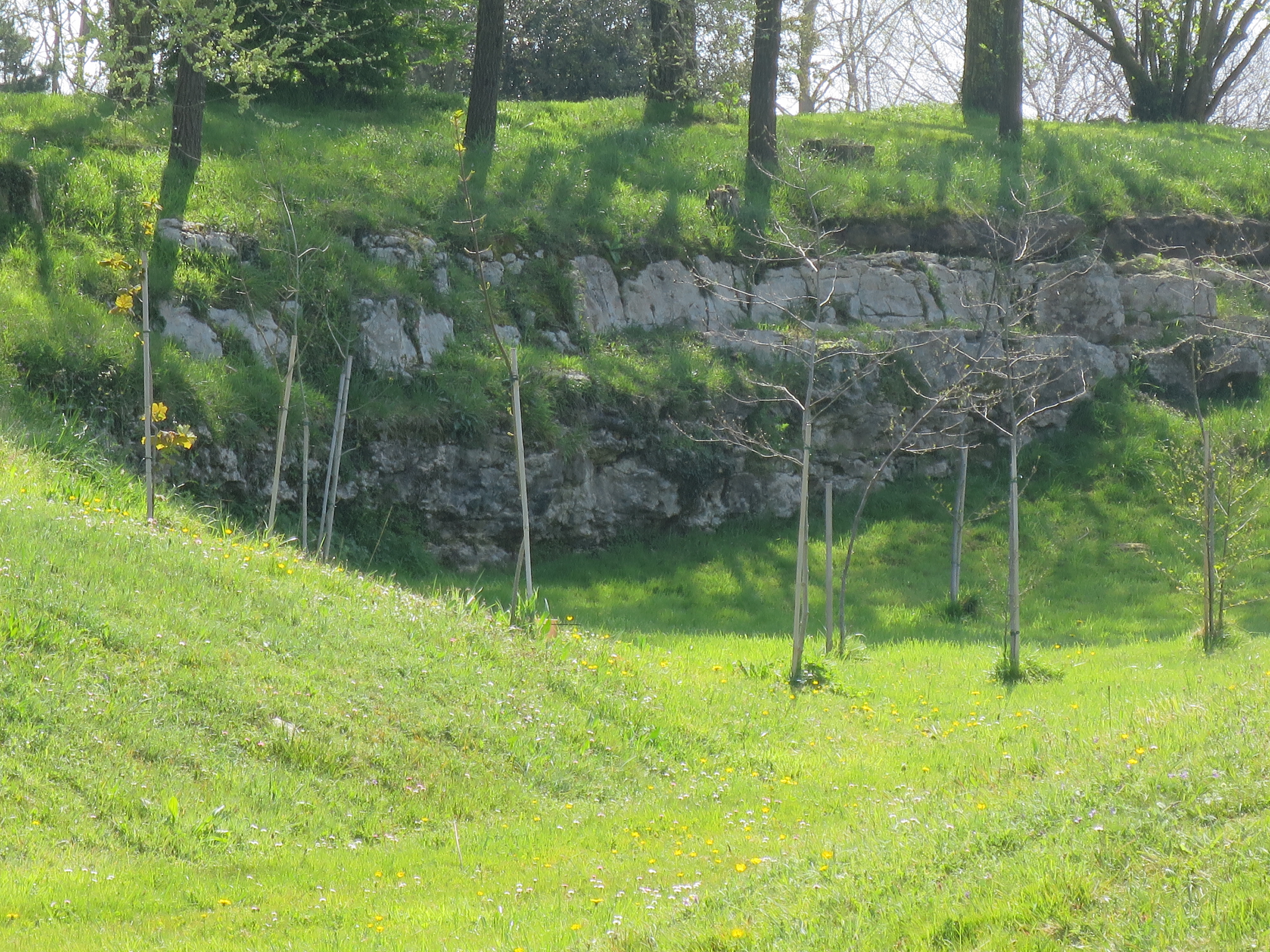 Verschütteter Eingang der Höhle von Altamira